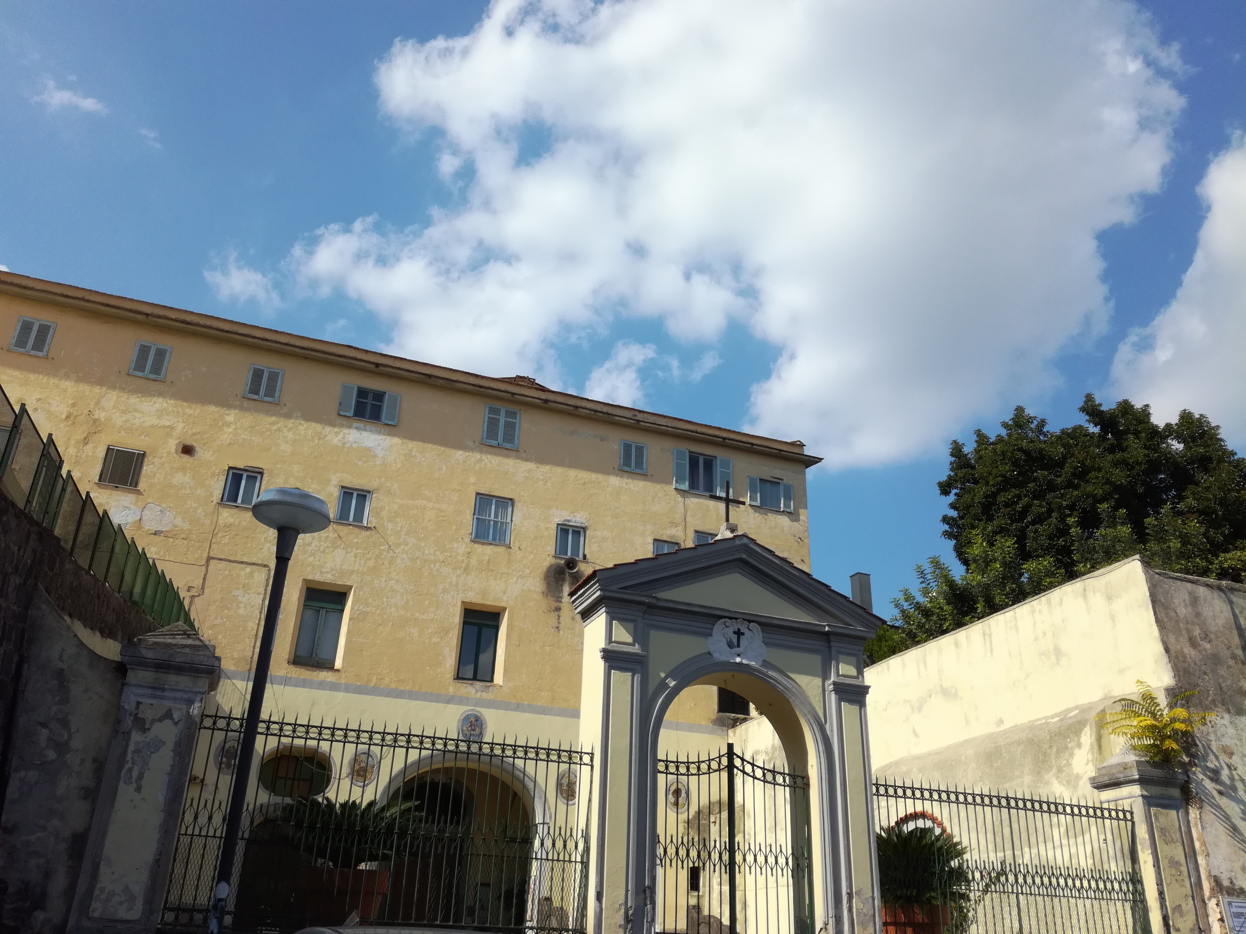 Chiesa di Sant'Eframo Vecchio (Napoli)